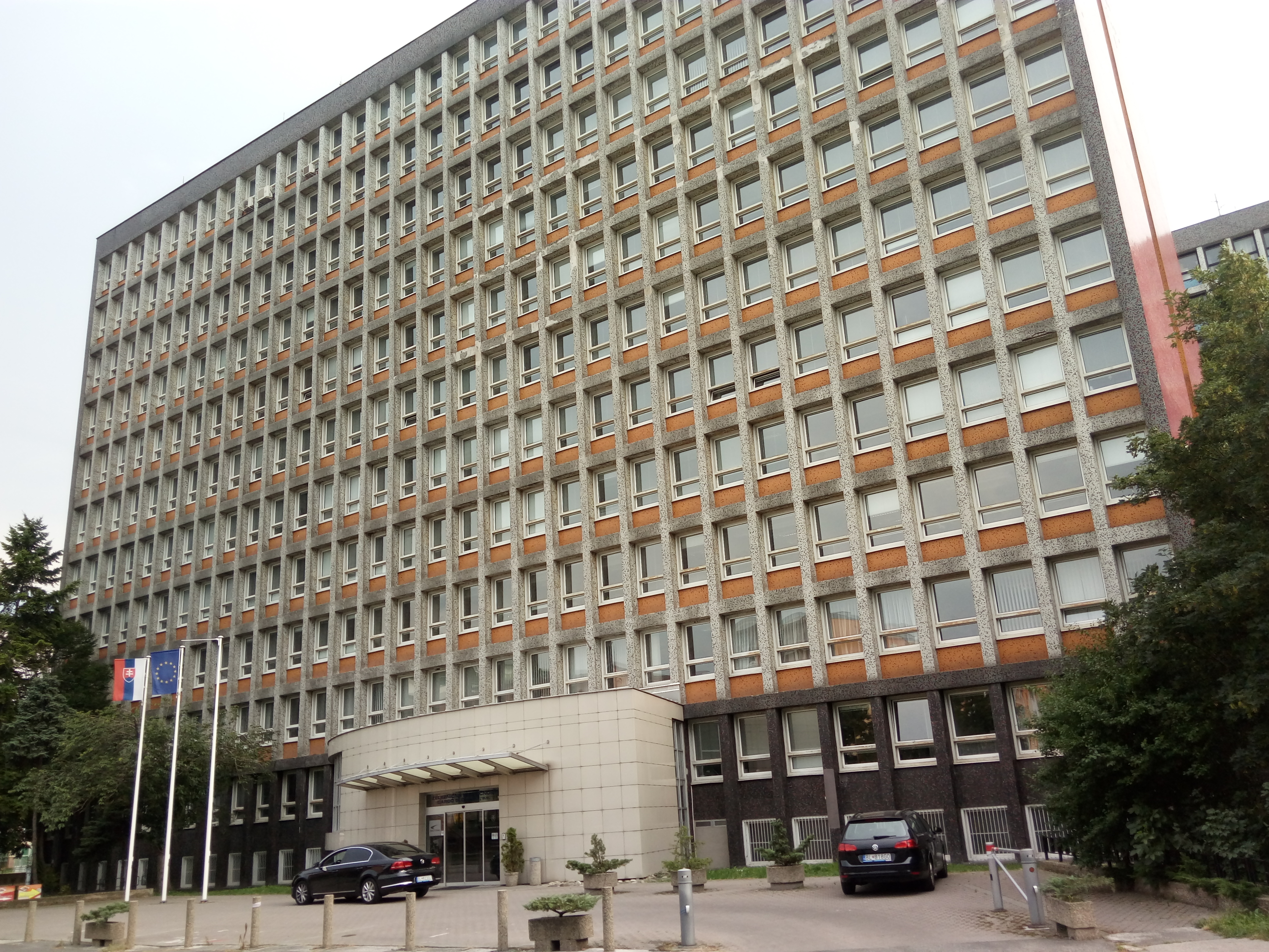 Drieňová 24, Ružinov, Bratislava